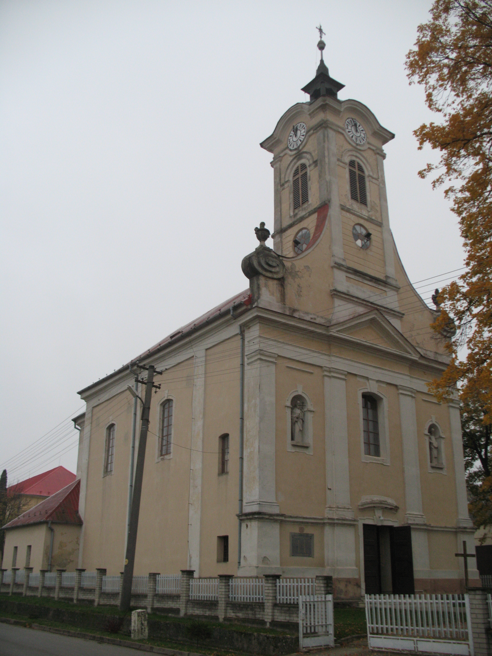 Kovarc